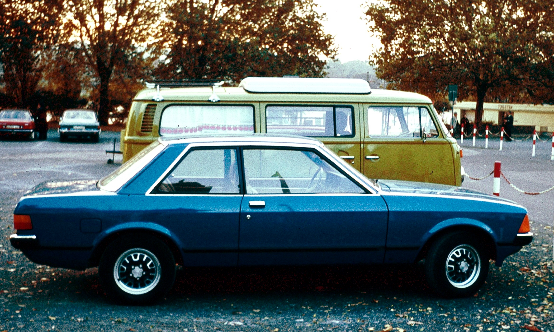 Ford Granada 2 door